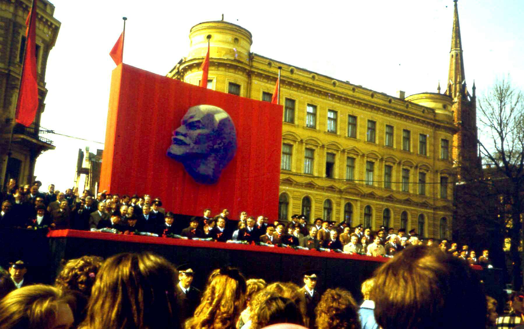 Rīga, 1988.g.